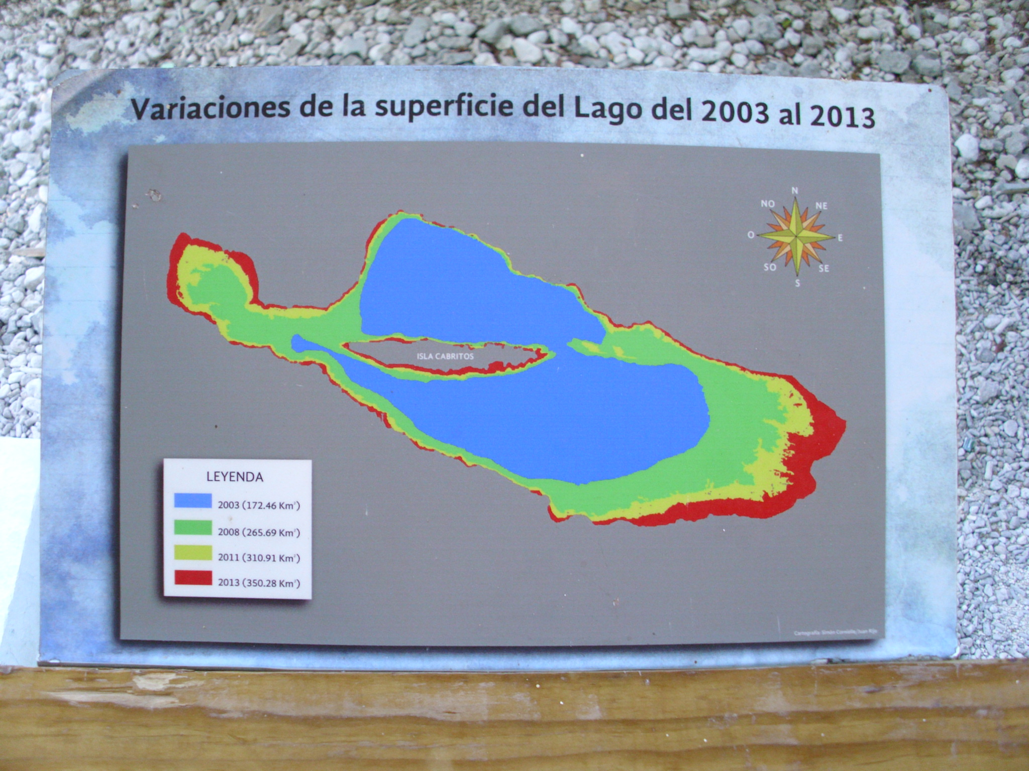 Groei van het Lago Enriquillo tot 2014. Info bij bezoekerscentrum van het meer.